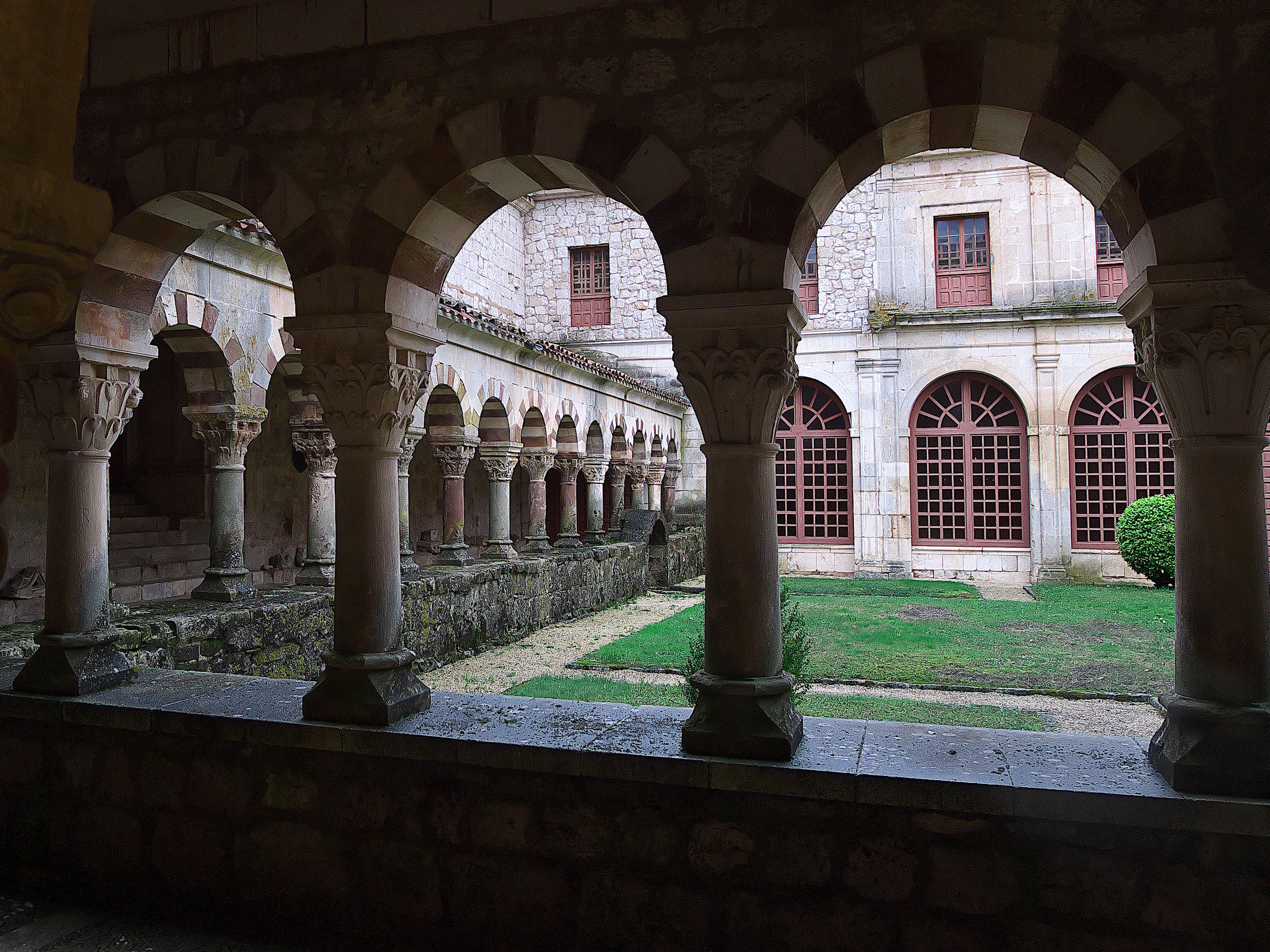 Claustro románico del monasterio